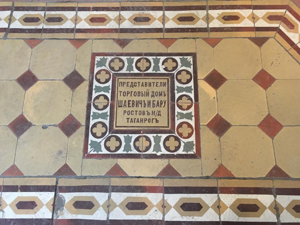 Логотип Торгового Дома "Шаевич и Бару" в здании бывшей Владикавказской почтово-телеграфной конторы во Владикавказе, 1911 год. Сегодня - здание почты на улице Горького, Владикавказ